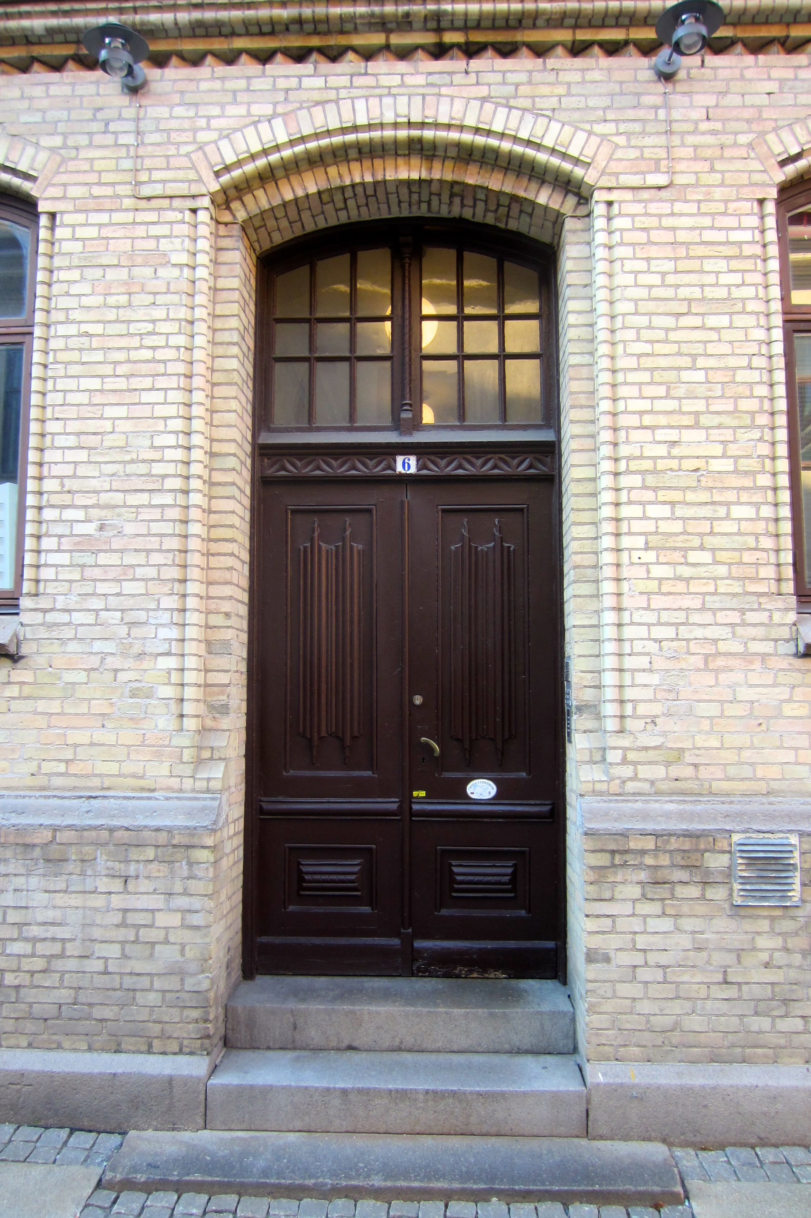 Porten till Vallgatan 6 i Göteborg.